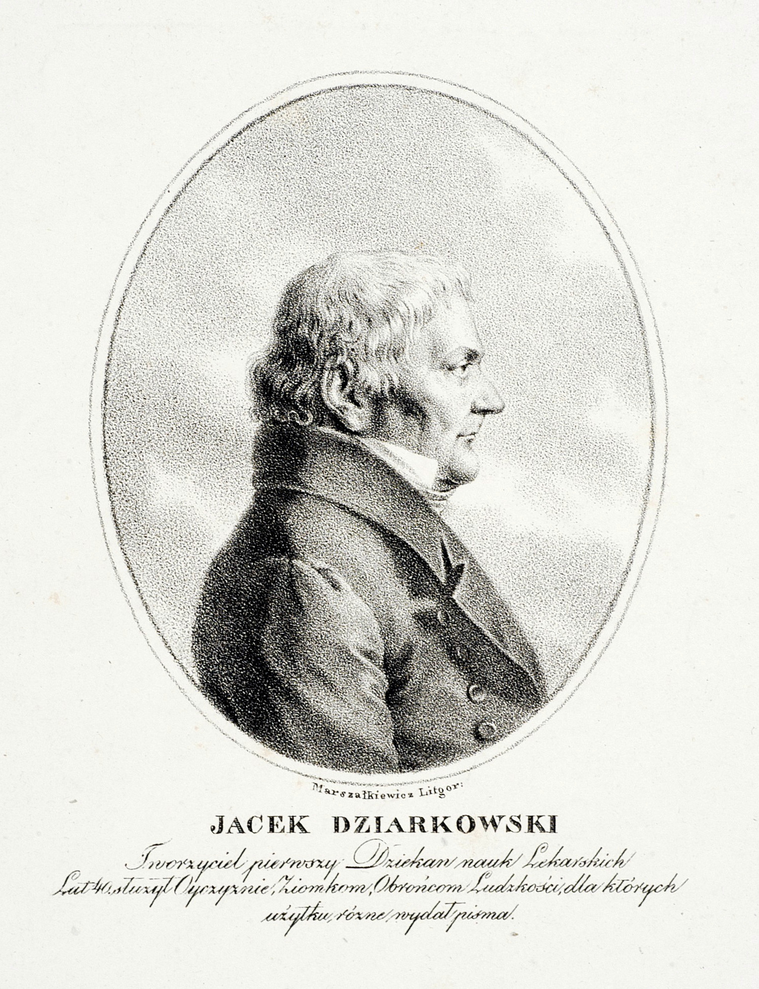 Hiacynt Dziarkowski